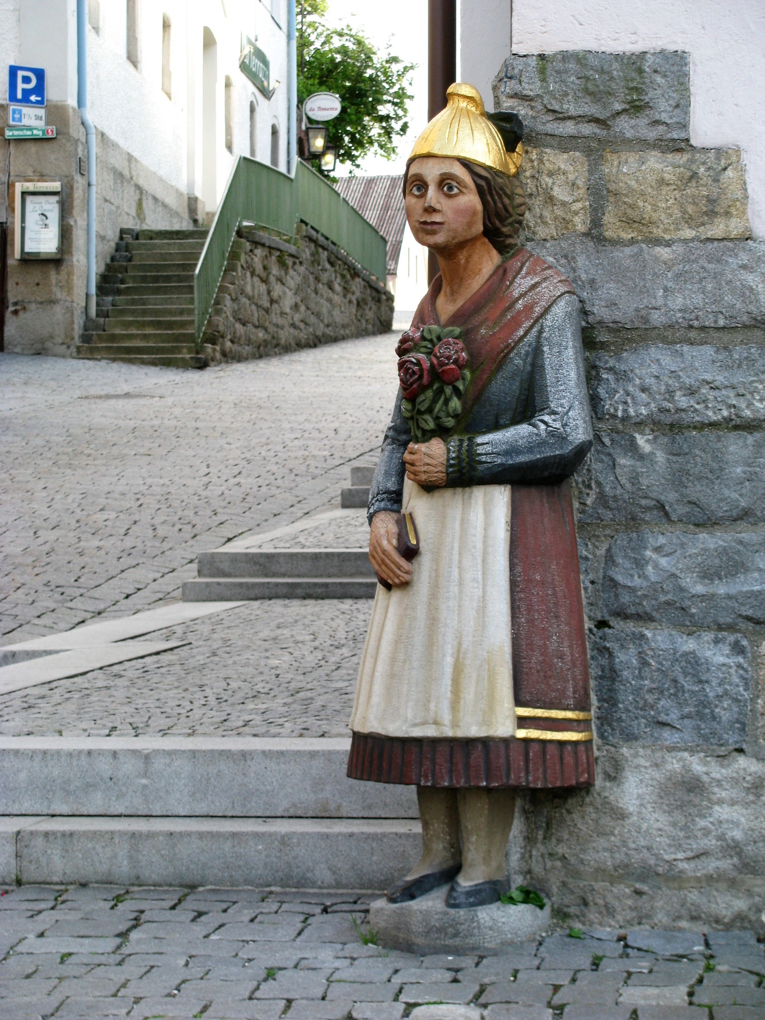 „Stoanerne Gretl“; Figur aus Granit von Manfred Werner am Marktplatz von Waldkirchen; 1972 als Gegenpart zum „Ewigen Hochzeiter“ (ein Radabweiserstein aus dem 19. Jahrhundert) aufgestellt